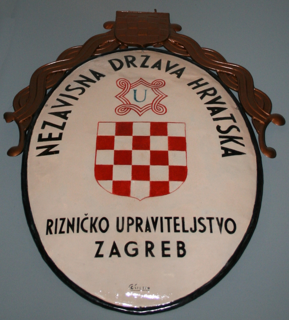 Ploča Rizničkog upraviteljstva NDH u Muzeju grada Zagreba tijekom Noći muzeja